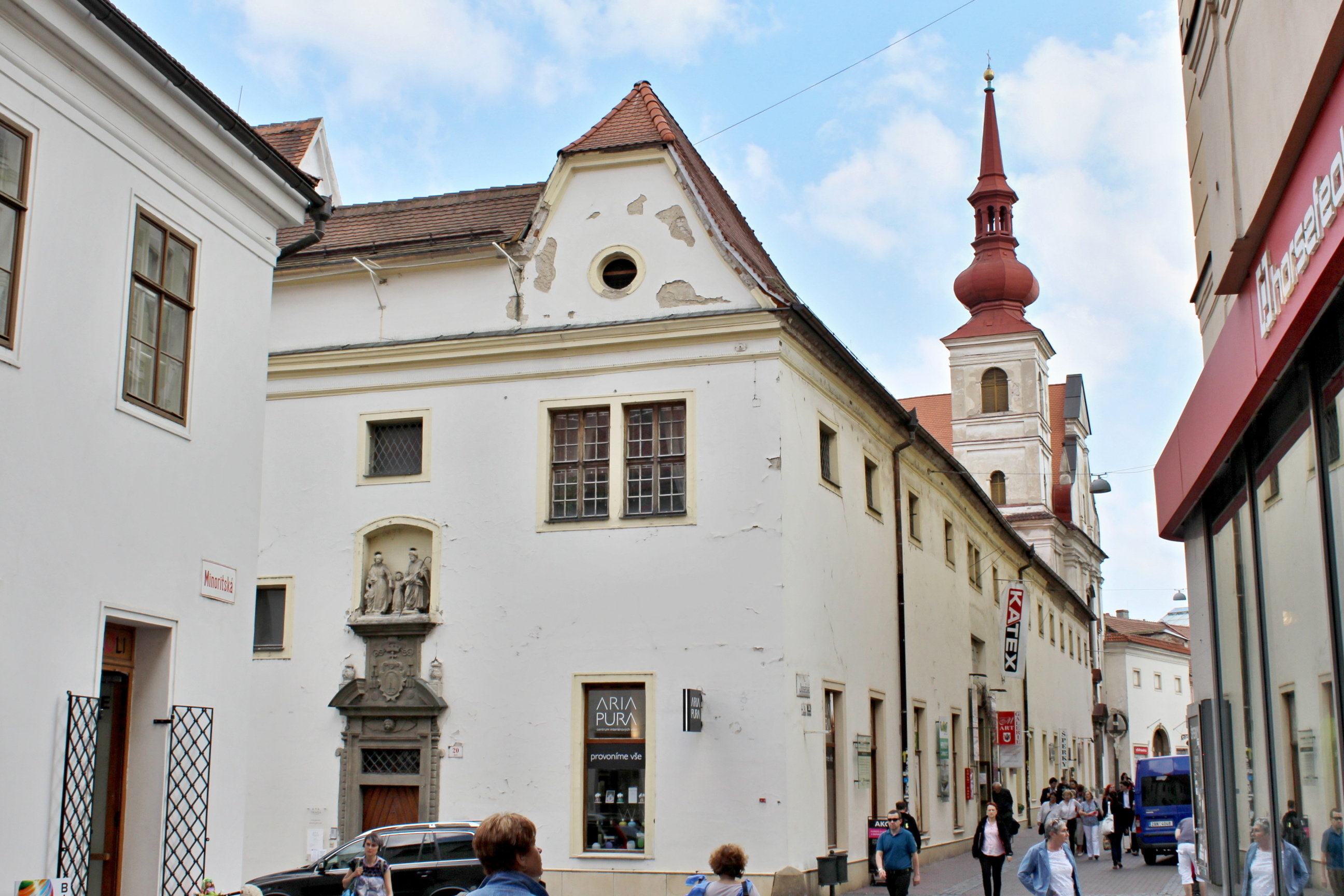 Brno, klášter voršilek s kostelem sv. Josefa